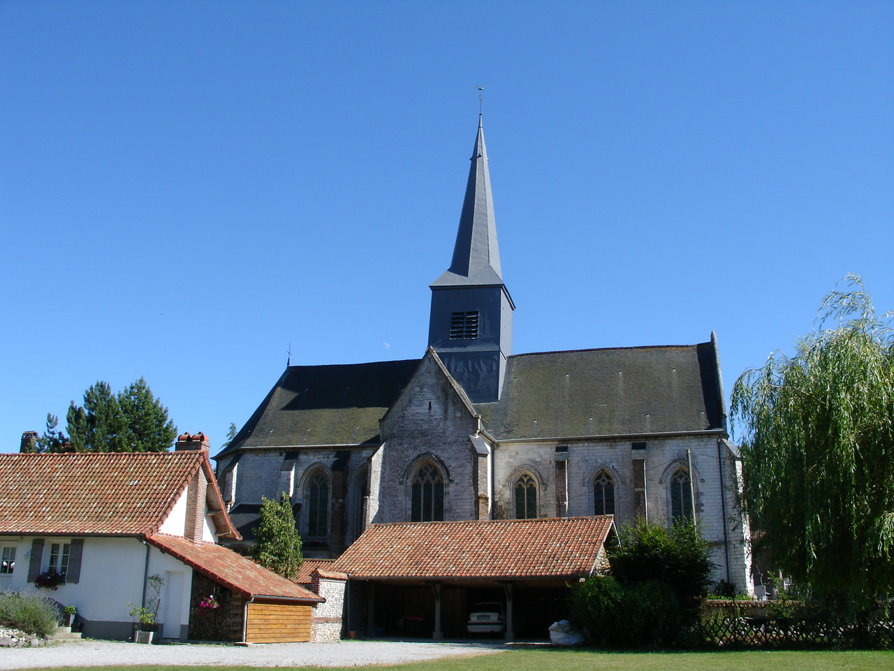 Église de Clenleu